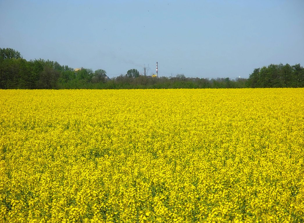 Pole rzepaku na Kujawach